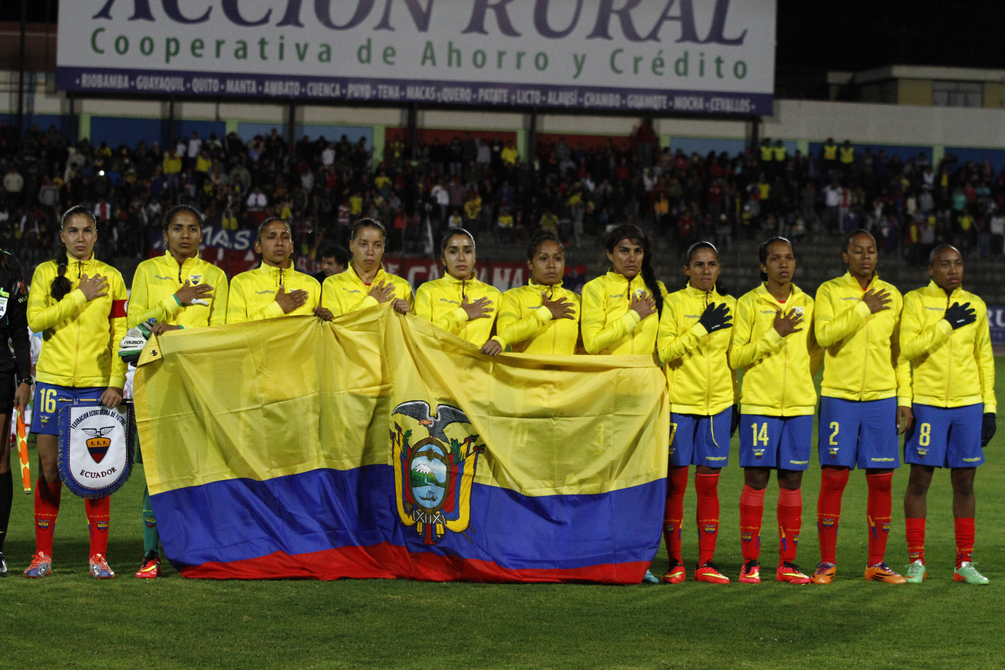 Riobamba (Chimborazo), 11 sep (Andes).- En el estadio Olimpico de la ciudad de Riobamba se jugó el primer partido de la selección ecuatoriana frente a la selección de Perúp en el campeonato Copa América Femenina de Fútbol Ecuador 2014. Foto: Micaela Ayala V./Andes